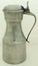 Tappit hen - ein Zinnkrug schottischen Ursprungs.